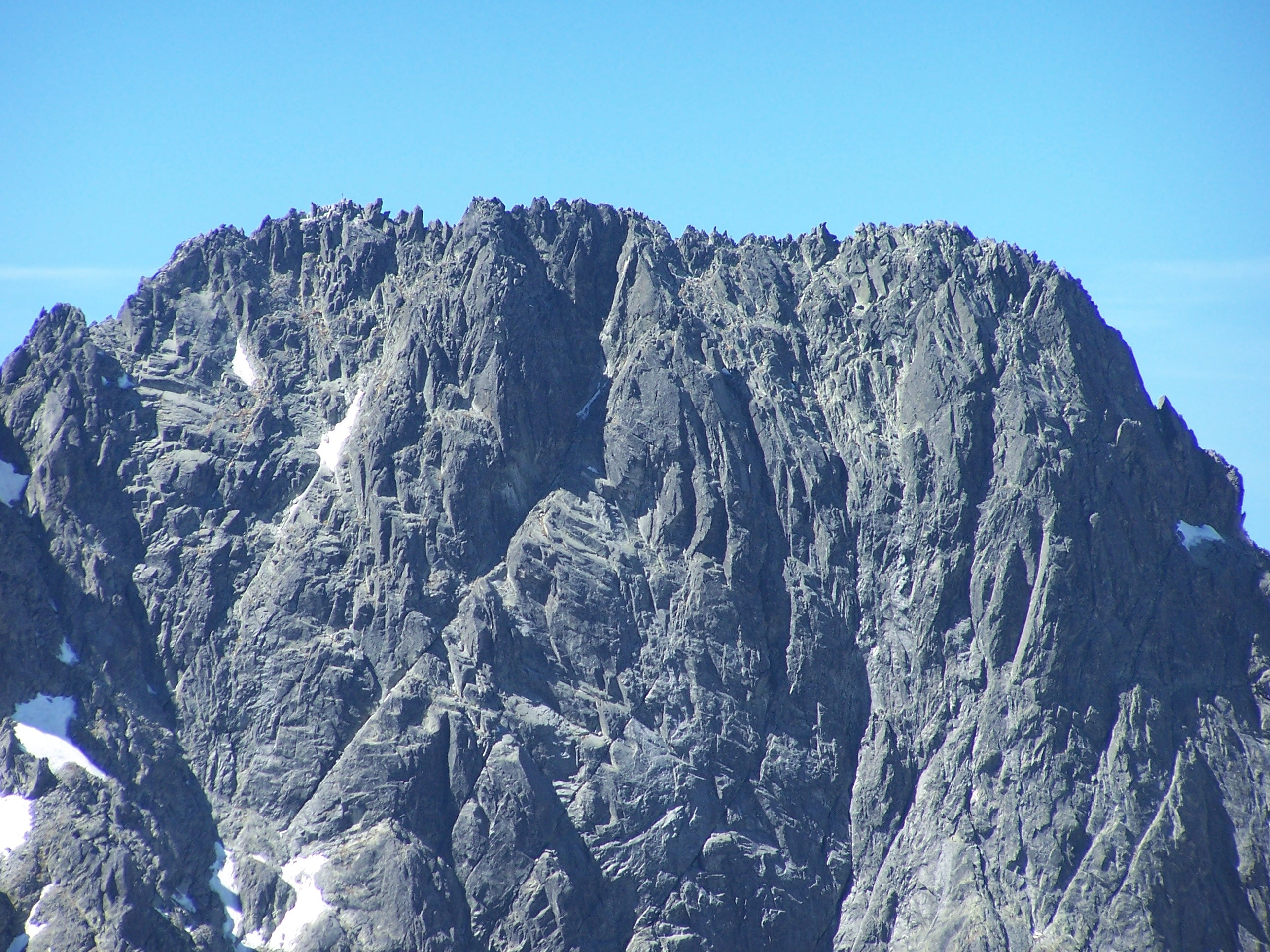 Widok ze Staroleśnego Szczytu na grań głównego szczytu Gerlacha